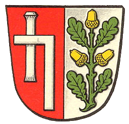 Wappen von Offenthal, Stadtteil von Dreieich